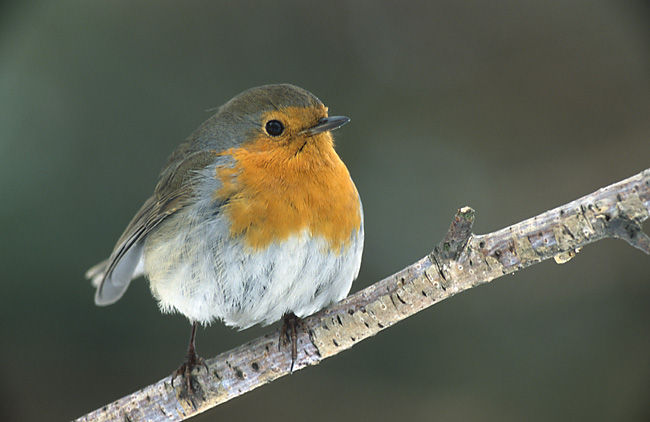 European Robin (Erithacus rubecula, cat.)